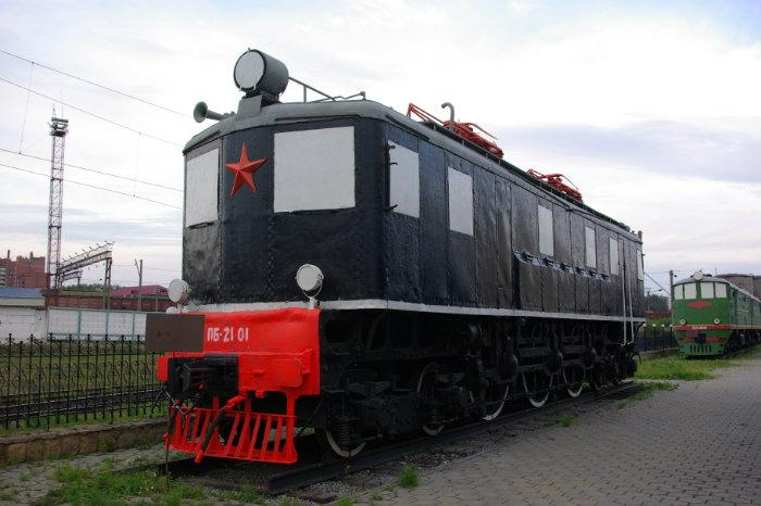 ПБ21 в Екатеринбургском железнодорожном музее